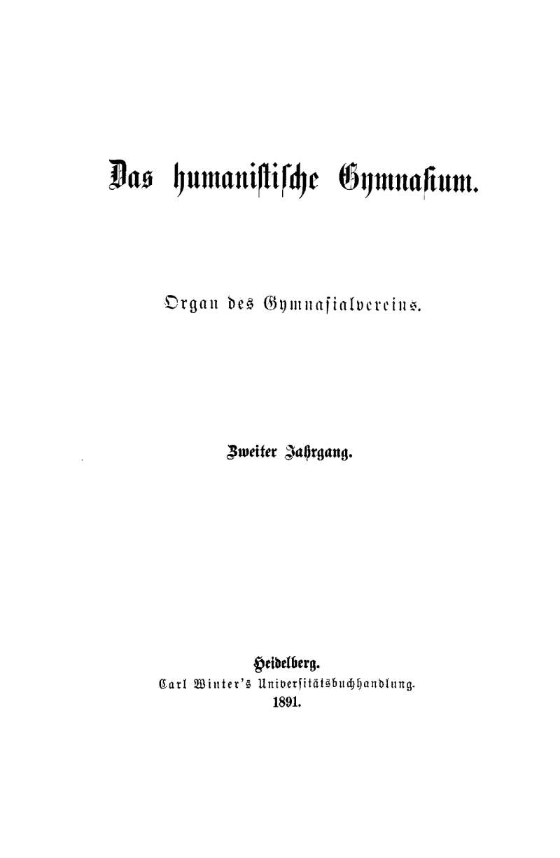 Titelseite der Zeitschrift / Title page of the periodical